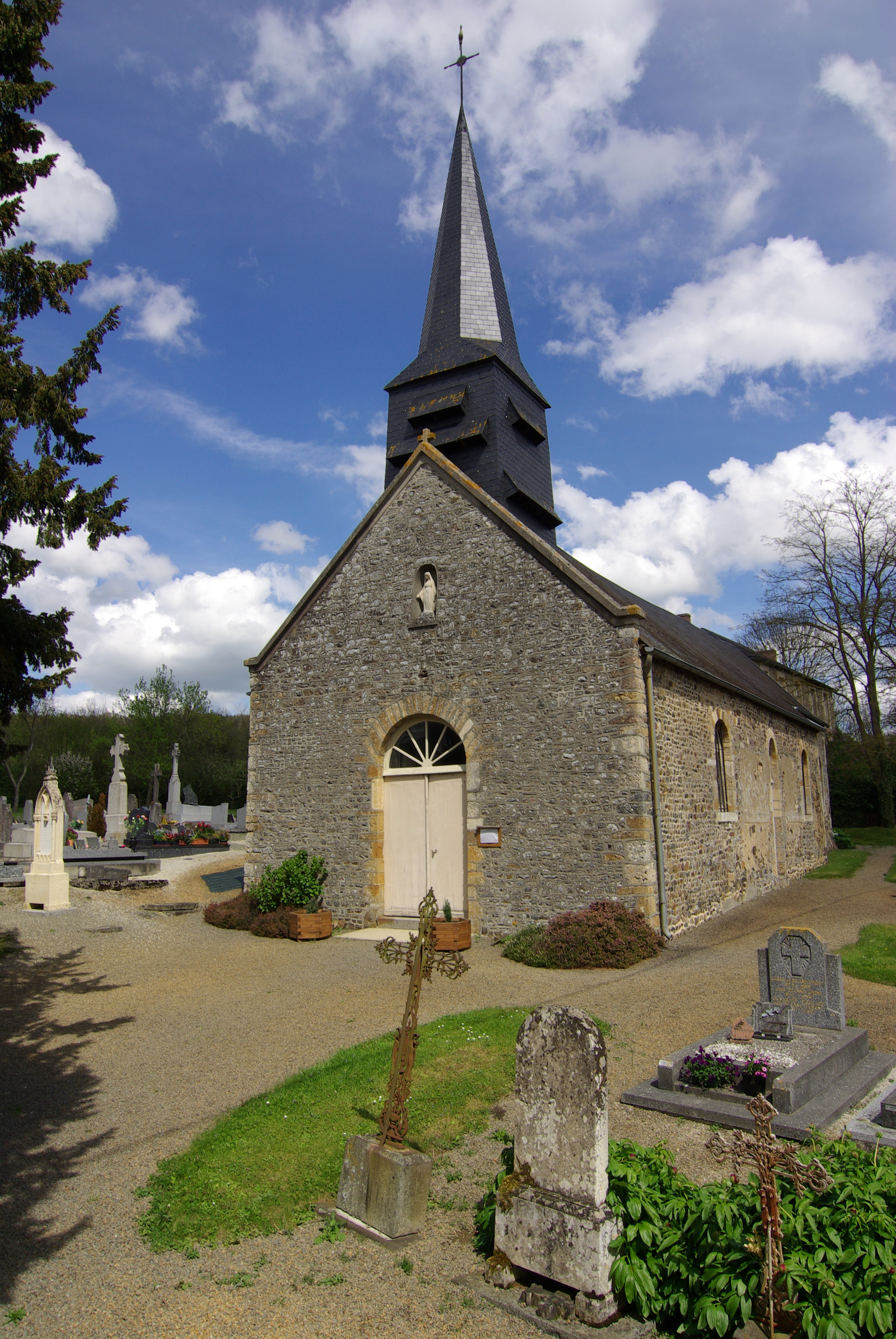 L'église St Pierre à Le Bô, Calvados.